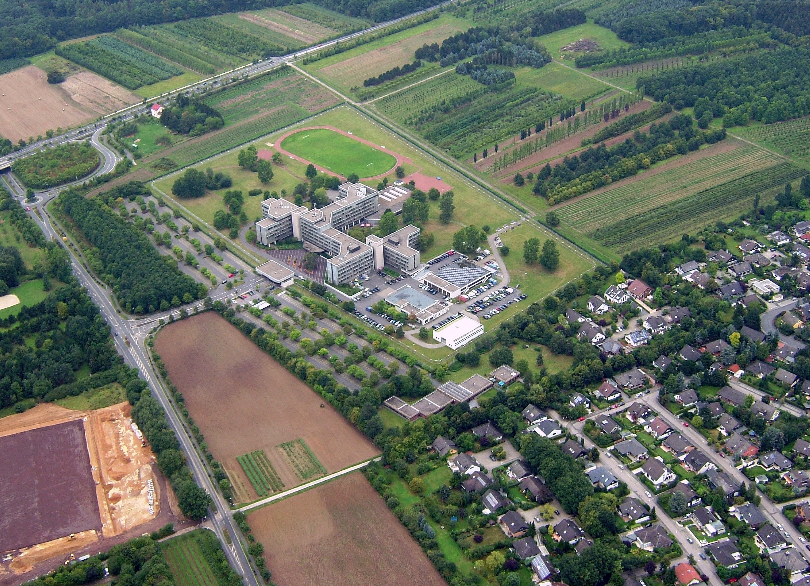 Merl Nordwest – August 2011, Luftbild aus südlicher Richtung